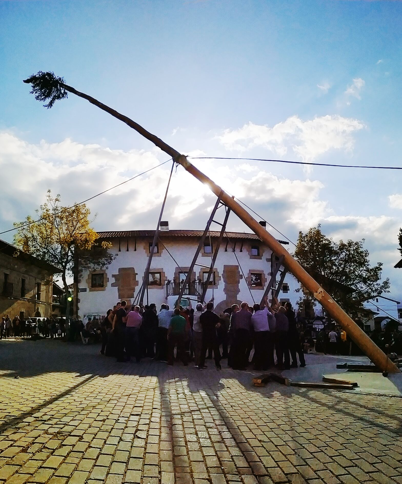 Iturmendiko herritarrak maiatza altxatzen, herriko plazan